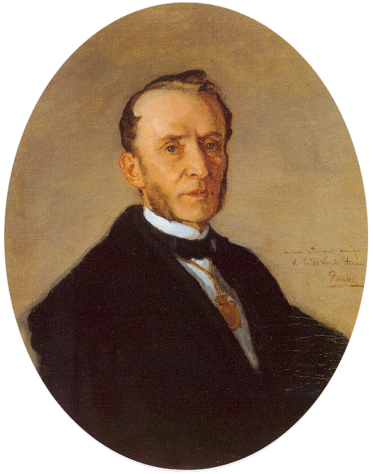 Vicente Asuero y Cortázar